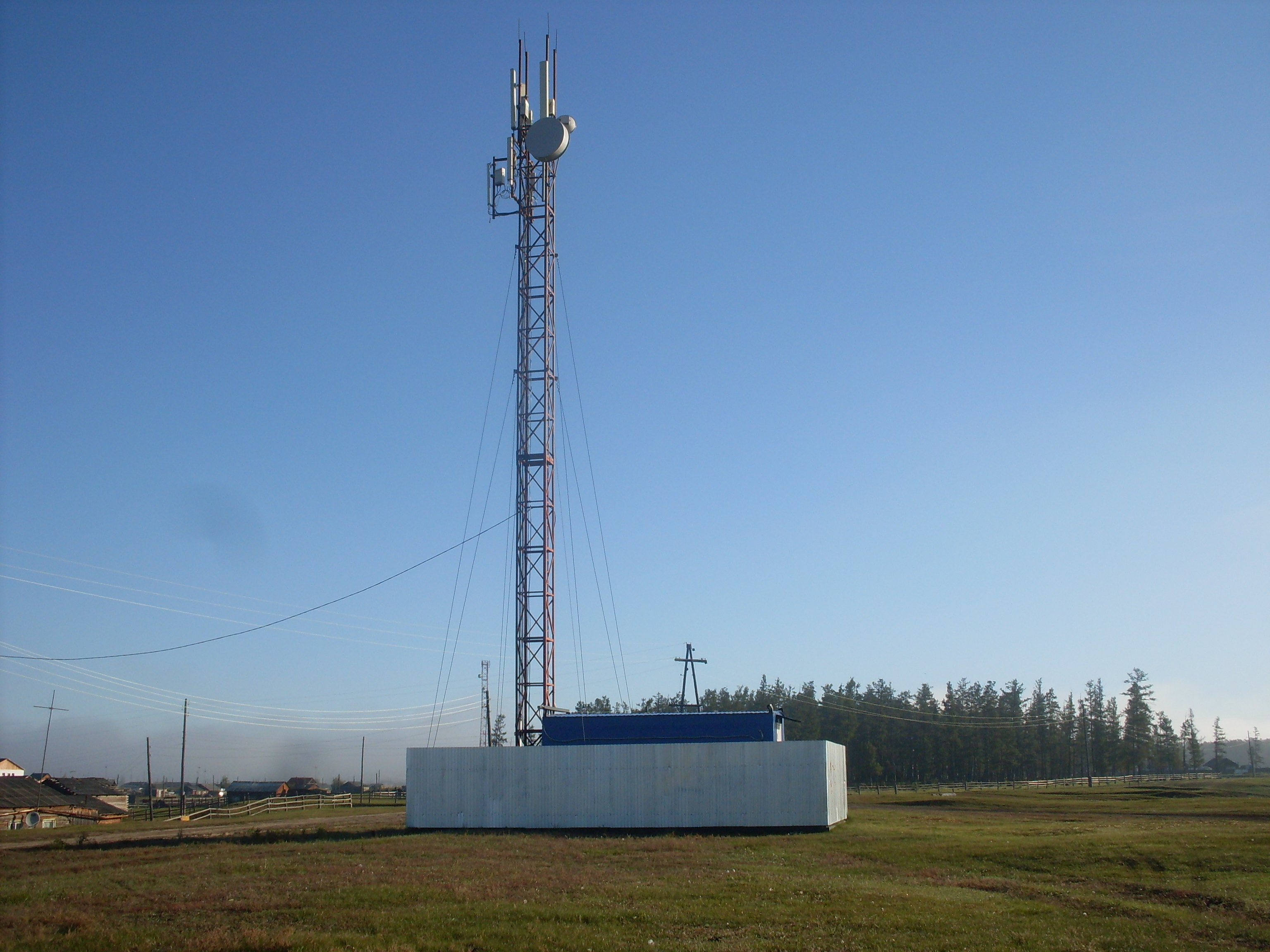 Антенна сотовой связи МТС. с.Дябыла. Чурапчинский улус. РС(Я)